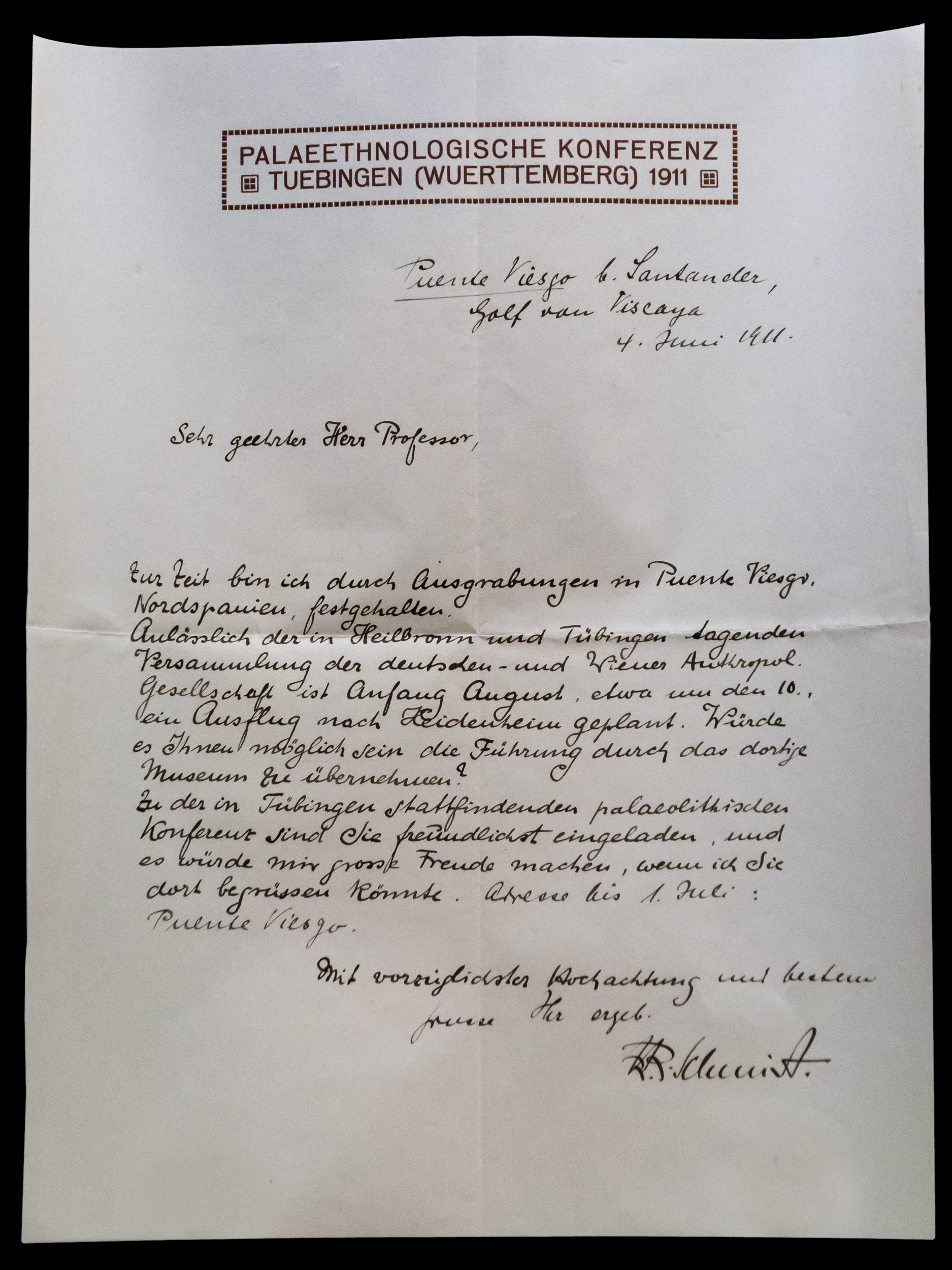 Handschriftlich verfasster Brief Robert Rudolf Schmidts an Eugen Gaus vom 4. Juni 1911. Puente Viesgo b. Santander, Golf von Vizcaya 4. Juni 1911 Sehr geehrter Herr Professor, zur Zeit bin ich durch Ausgrabungen in Puente Viesgo, Nordspanien, festgehalten. Anlässlich der in Heilbronn und Tübingen tagenden Versammlung der deutschen – und Wiener Anthropol. Gesellschaft ist Anfang August, etwa um den 10., ein Ausflug nach Heidenheim geplant. Würde es Ihnen möglich sein die Führung durch das dortige Museum zu übernehmen? Zu der in Tübingen stattfindenden palaeolithischen Konferenz sind Sie freundlichst eingeladen, und es würde mir grosse Freude machen, wenn ich Sie dort begrüssen könnte. Adresse bis 1. Juli: Puente Viesgo. Mit vorzüglichster Hochachtung und bestem Gruß Ihr ergeb. R.R. Schmidt